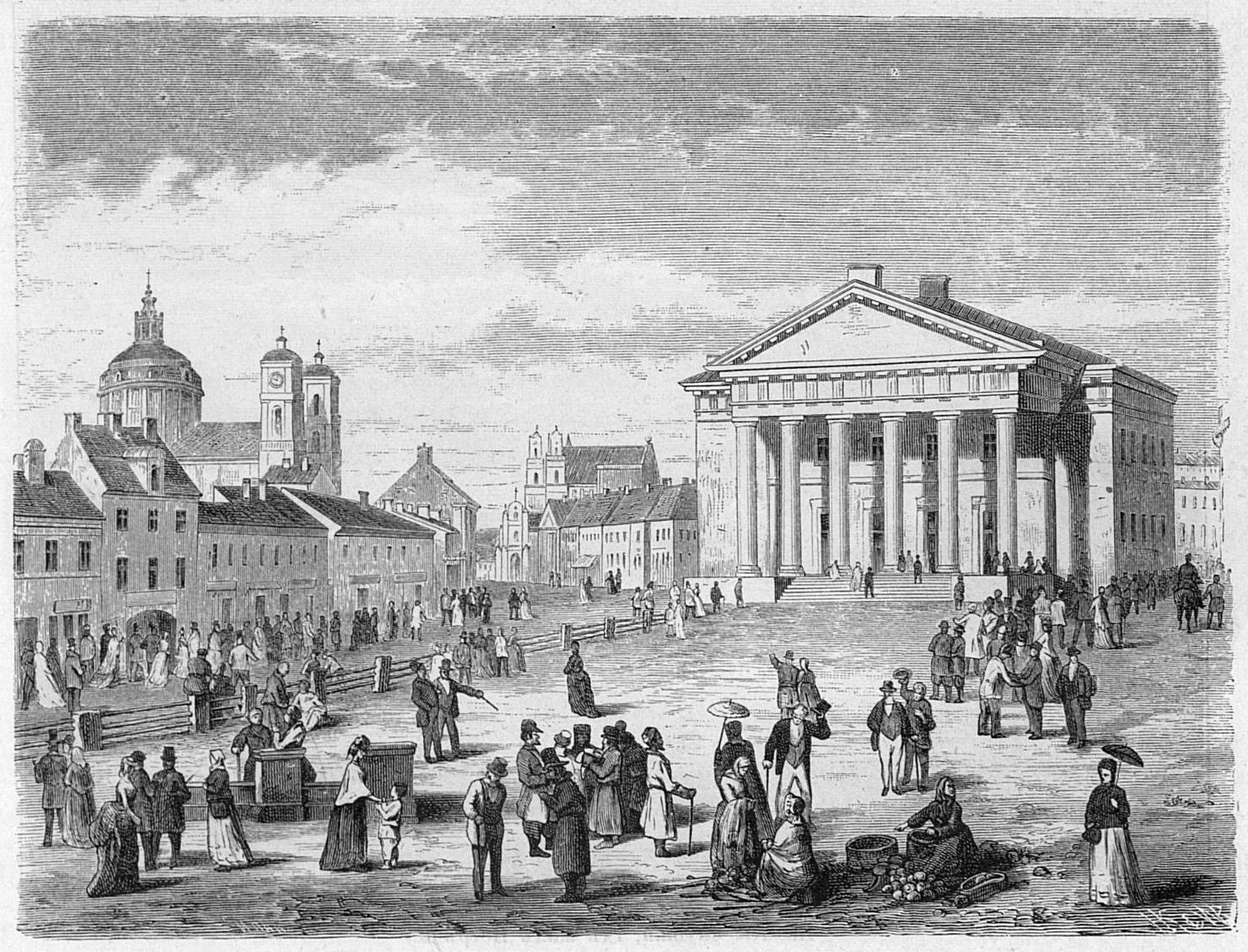 Беларуская (тарашкевіца): Вільня (Vilnia), пляц Ратушны (plac Ratušny)